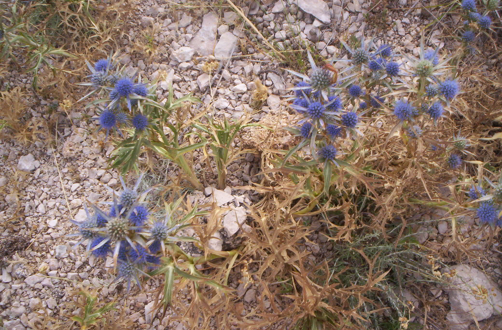 flora na Pagu